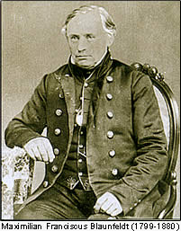 Maximilian Franciscus Blaunfeldt, Hardesvogt der Hüttener Harde von 1850 bis 1864.